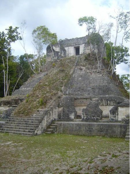 Nakum